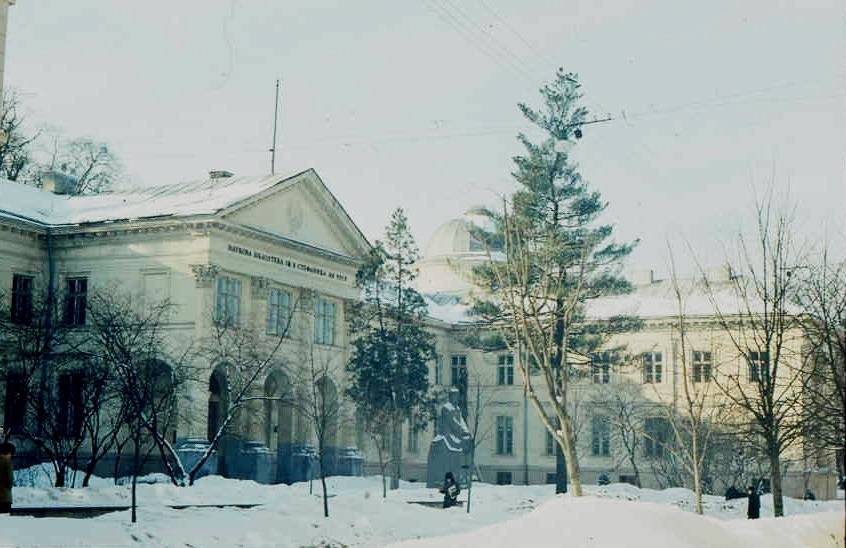 Lwów, gmach główny Ossolineum. Zima 1975